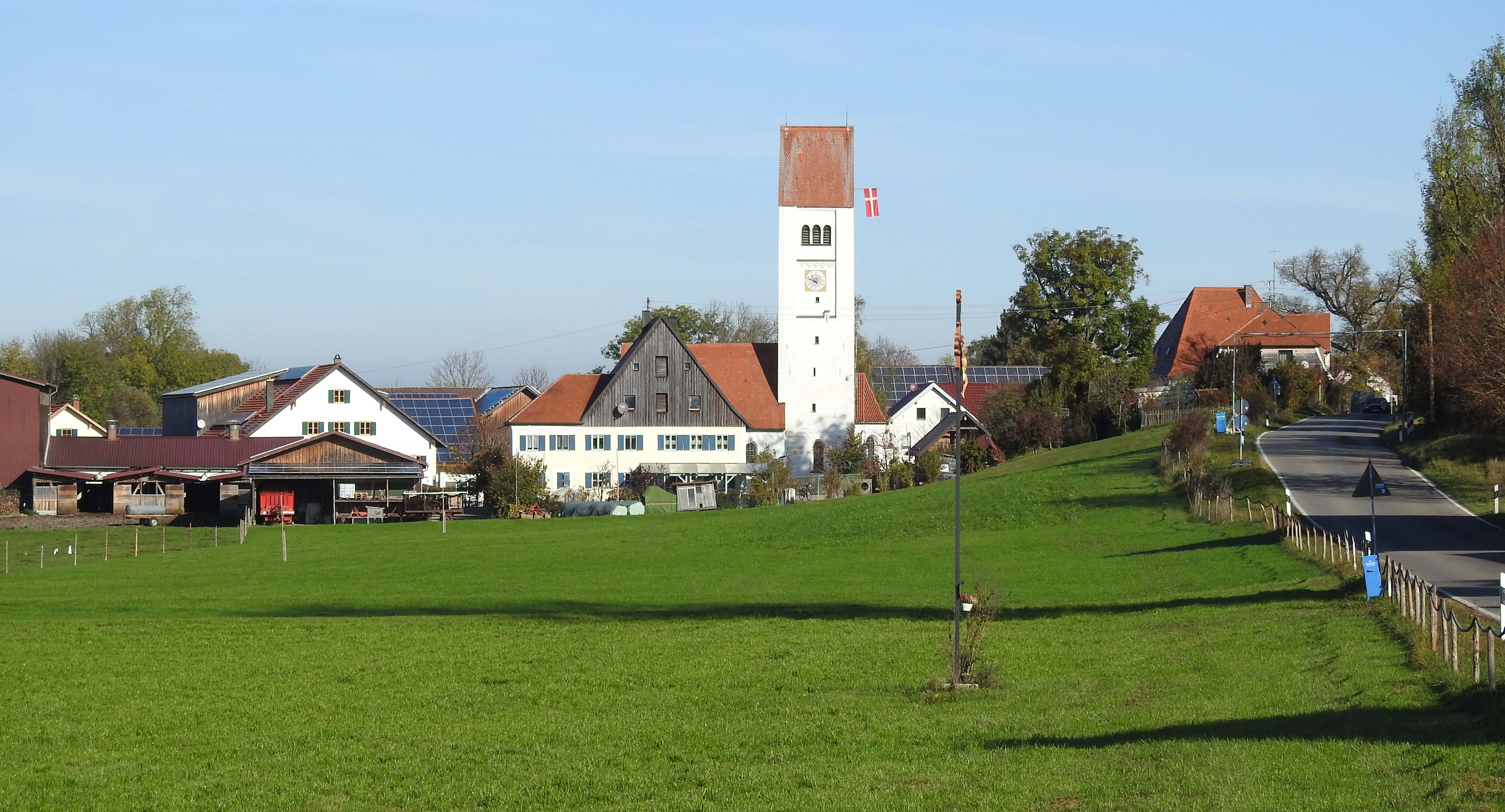 Eurishofen von Süden, Jengen